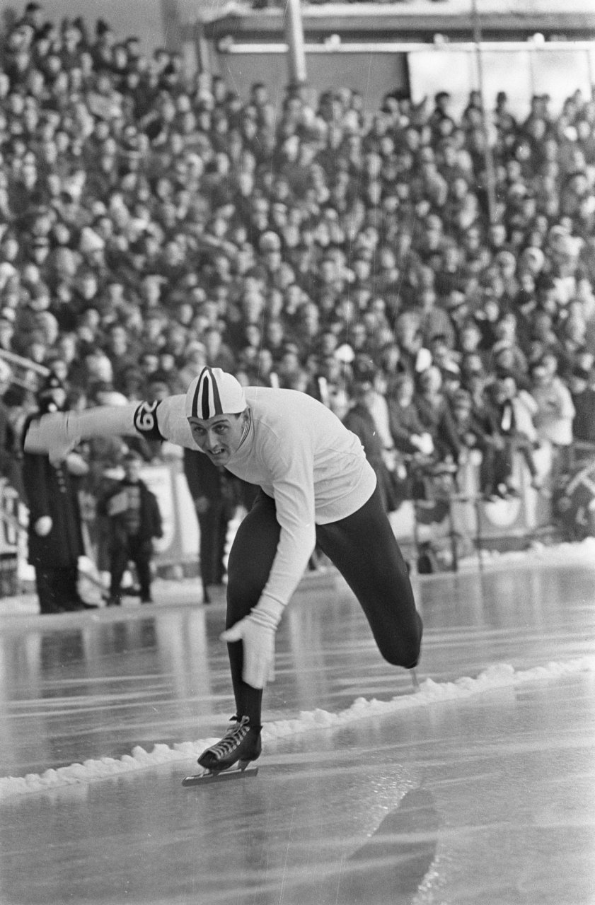 Wereldkampioenschappen schaatsen in Oslo, Magne Thomassen (Noorwegen) in aktie op de 500 meter